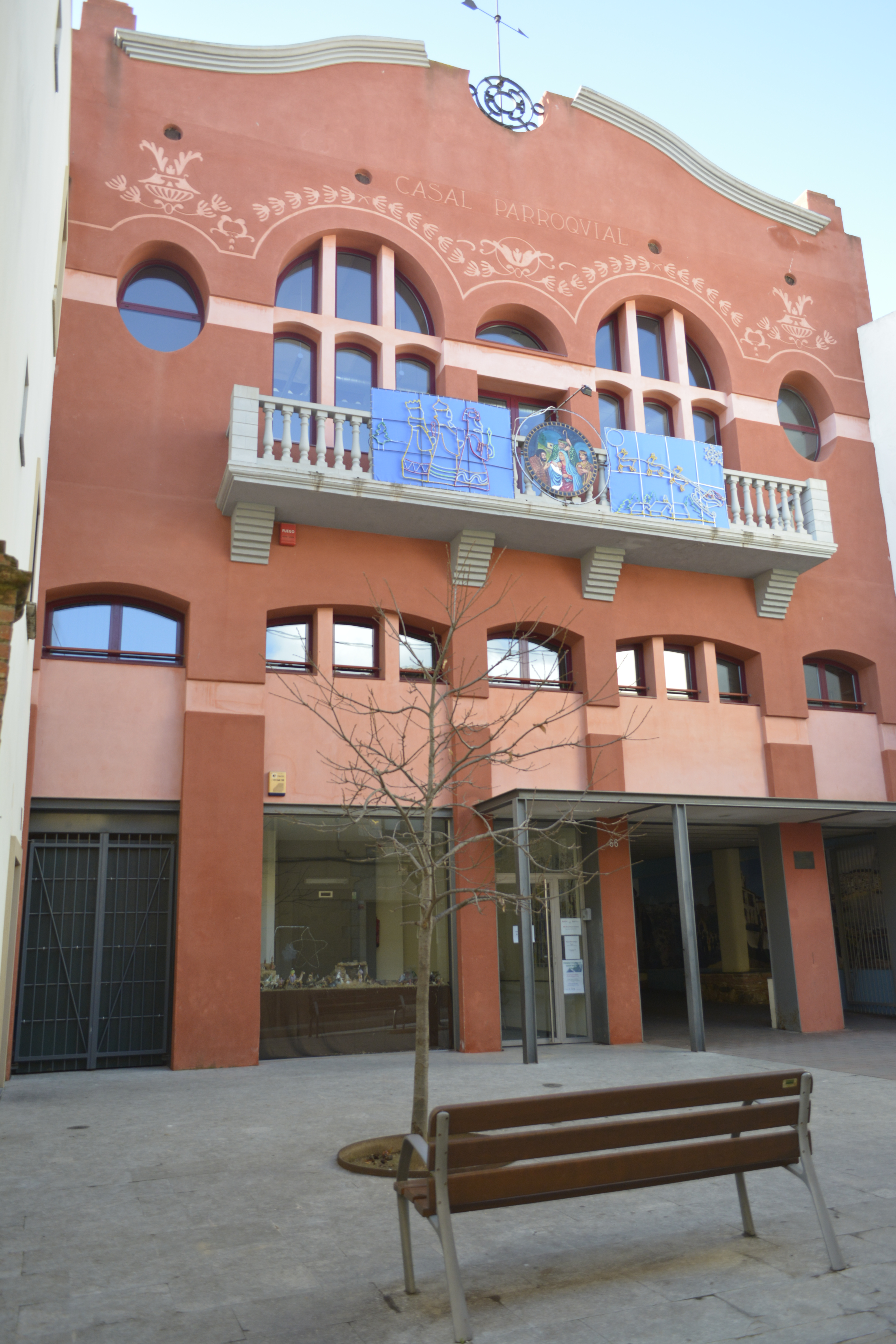 Imatge de l'actual Casal Popular